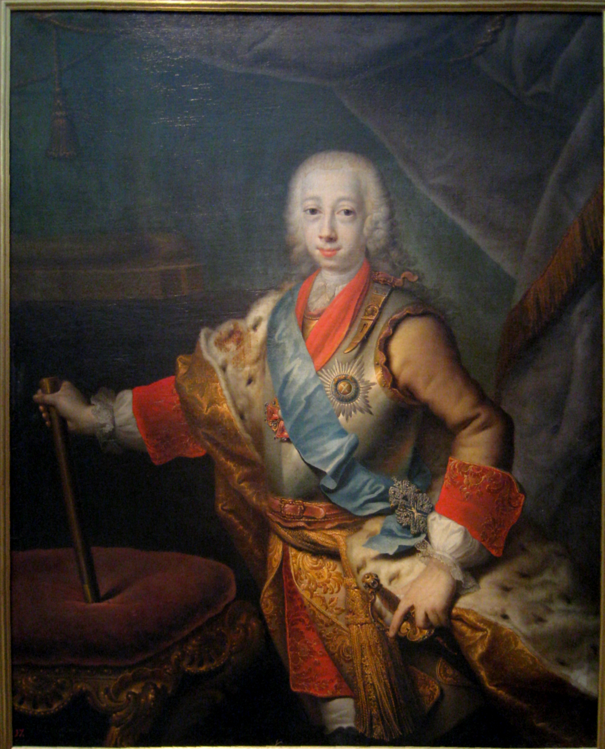 На портрете пятнадцатилетний великий князь изображен по всем законам парадного изображения: стоя в величественной позе на фоне колонн и бархатных драпировок, облаченный в парадный мундир, латы, с голубой лентой и знаком ордена Святого Андрея Первозванного. На левой стороне груди звезда указанного ордена. На шее знак голштинского ордена Святой Анны. Поступила в 1925 г. из Государственной Оружейной палаты (ранее собрание Коломенского дворца). Повторение портрета находится в Государственном Русском музее. Произведение записано в инвентарной книге Государственной Третьяковской галереи под номером 26746.